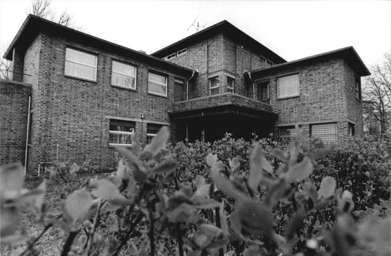 Gera, Rundfunkgebäude lER -27.3.90-Bau. Gera: Unter Denkmalsschutz steht das Gebäude in das der Geraer Rundfunk vor 30 Jahren einzog. Das Klinkerhaus wurde 1929 von Thilo Schoder im Bauhausstil errichtet. Zur Zeit wird innen renoviert. Tapetenwechsel bei der Mannschaft hat es schon vor einigen Wochen gegeben. Die Mitarbeiter haben ein Durchnittsalter von 29 Jahren. Frischer Wind und neue Ideen sollen "Thüringen 1" zu dem Sender des Terrotoriums machen. (ADN-Kasper) Information added by Wikimedia users.